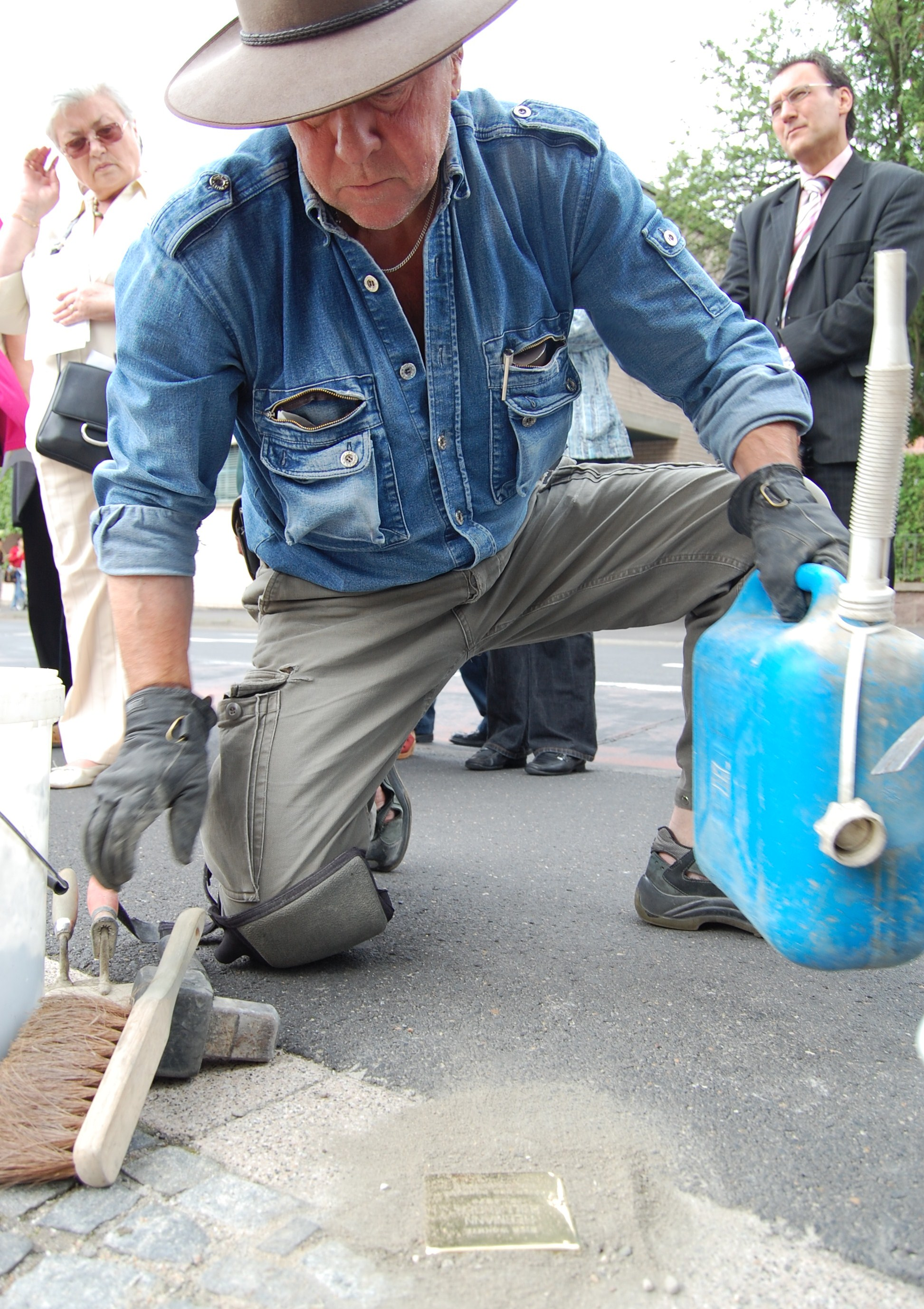 Der Kölner Künstler Gunter Demnig beim Verlegen von Stolpersteinen in Bad Kissingen